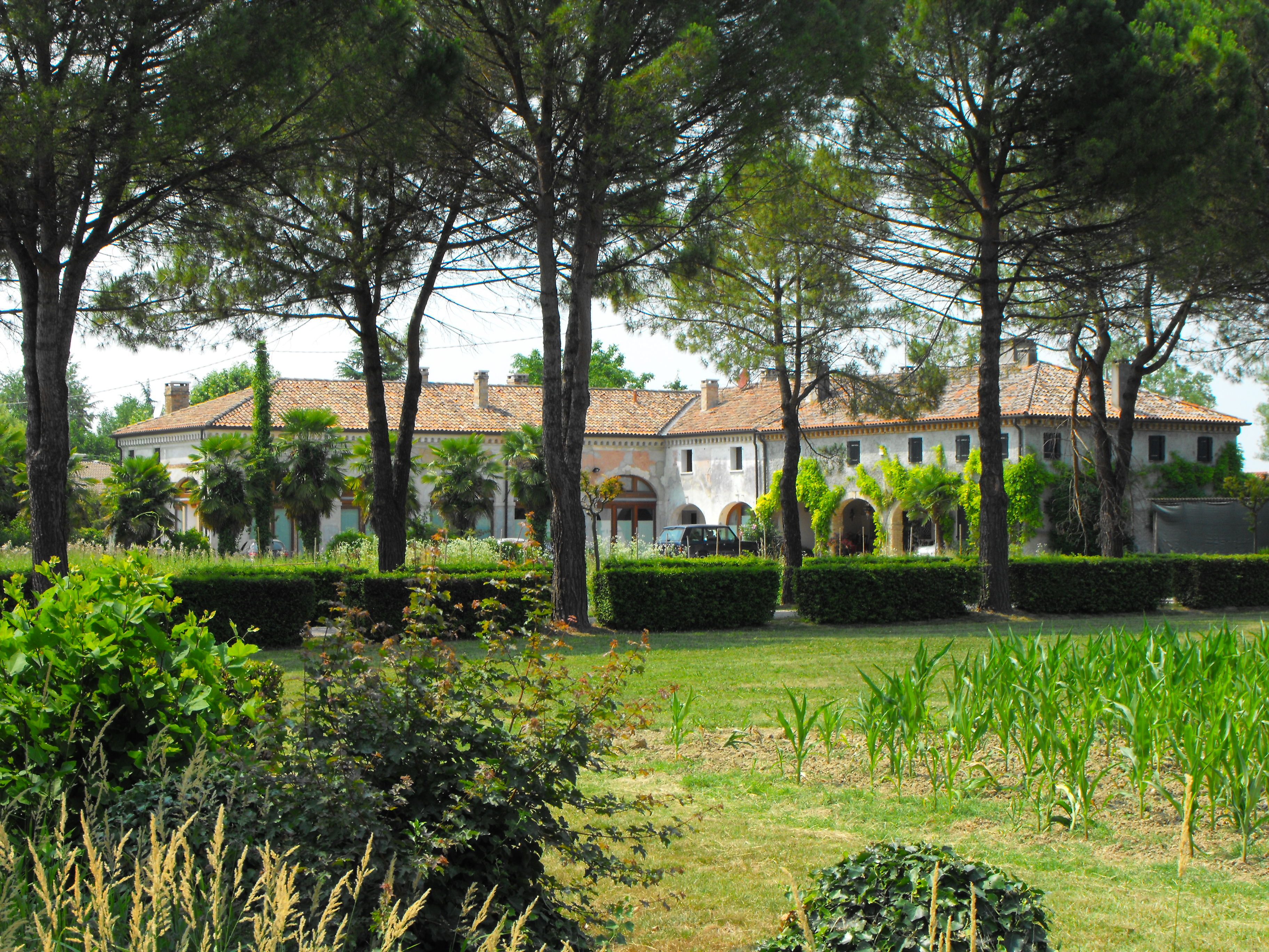 La barchessa di palazzo Algarotti, oggi scomparso (Mogliano Veneto)